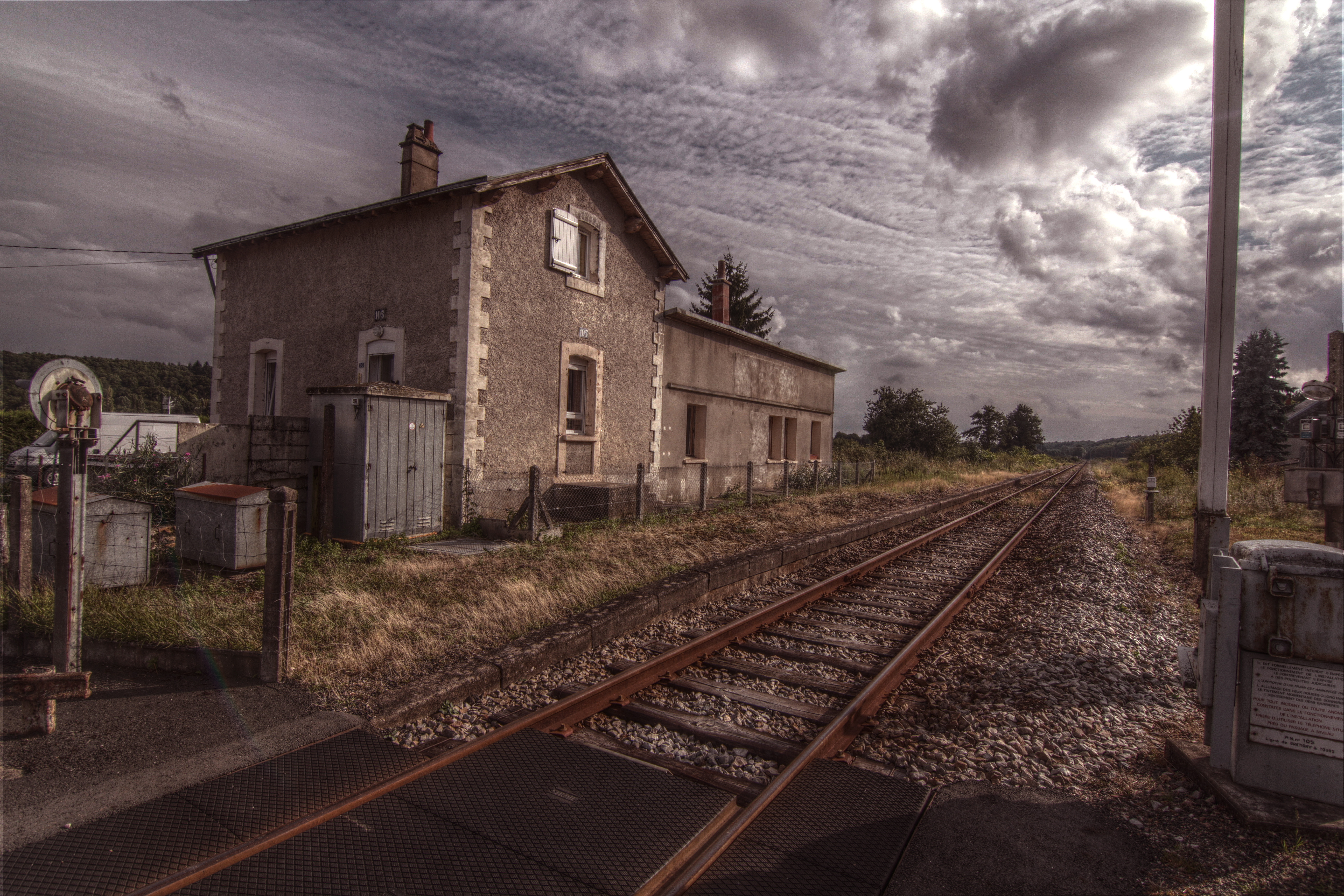 L ancienne gare de Saint Jean Froidmentel, vue direction Tours